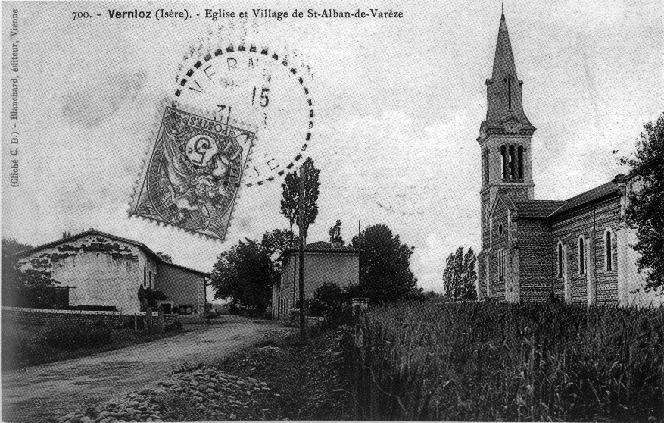 Vernioz, église et village à Saint-Alban-de-Varèze, en 1907